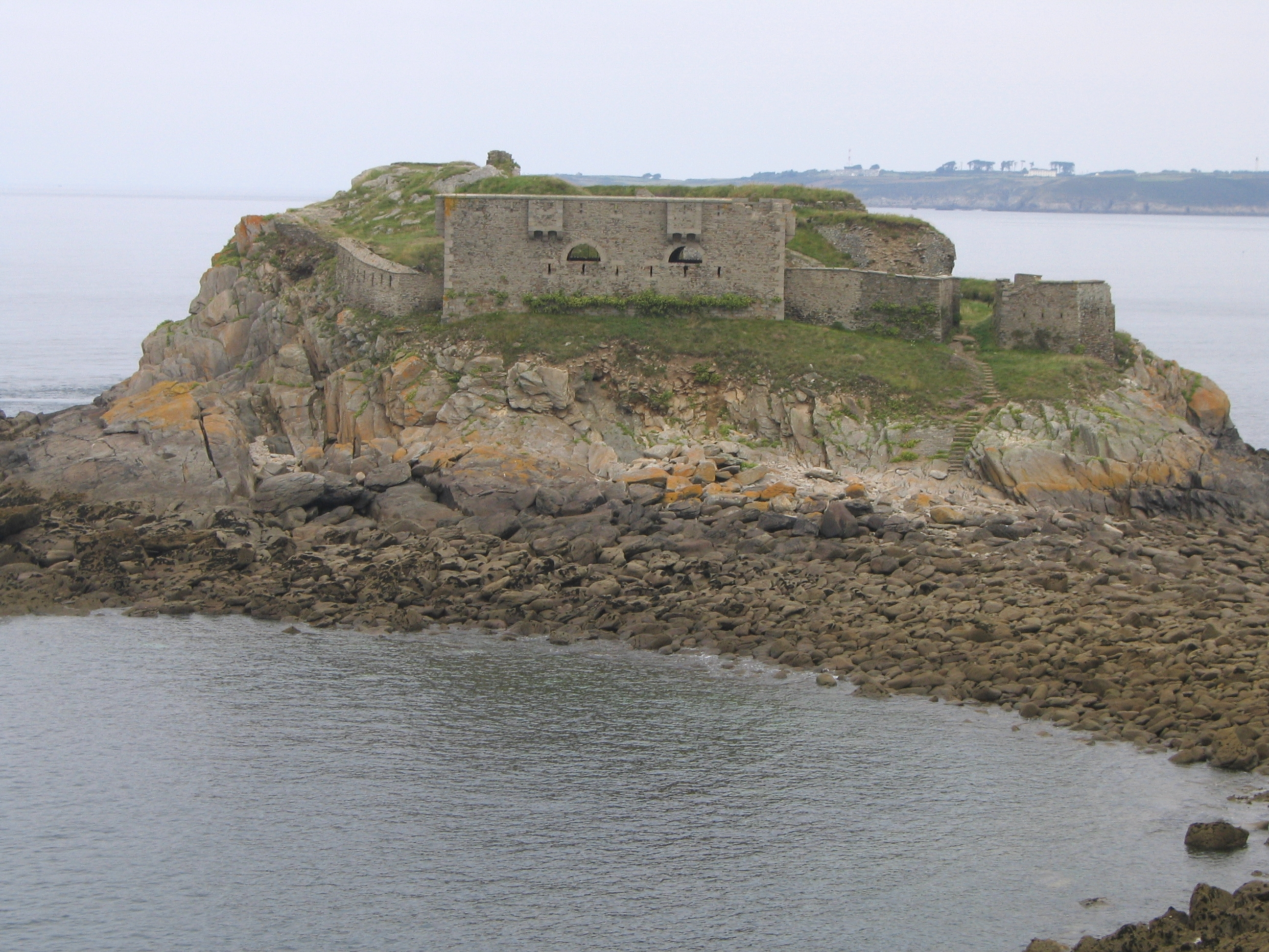 Le fort de l'Îlette de Kermorvan sur la presqu'île de Kermorvan